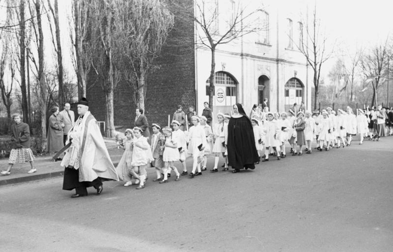 Kommunion